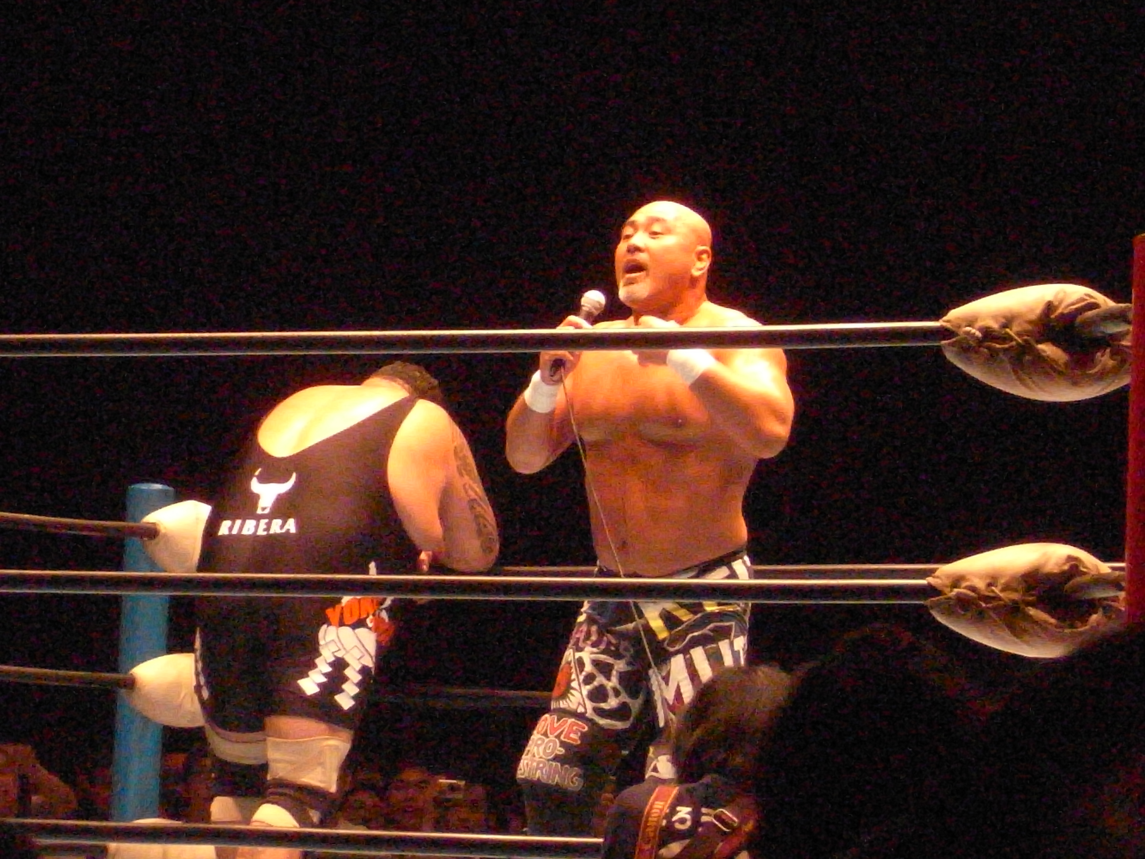 Keiji Mutoh (aka Great Muta) 2008